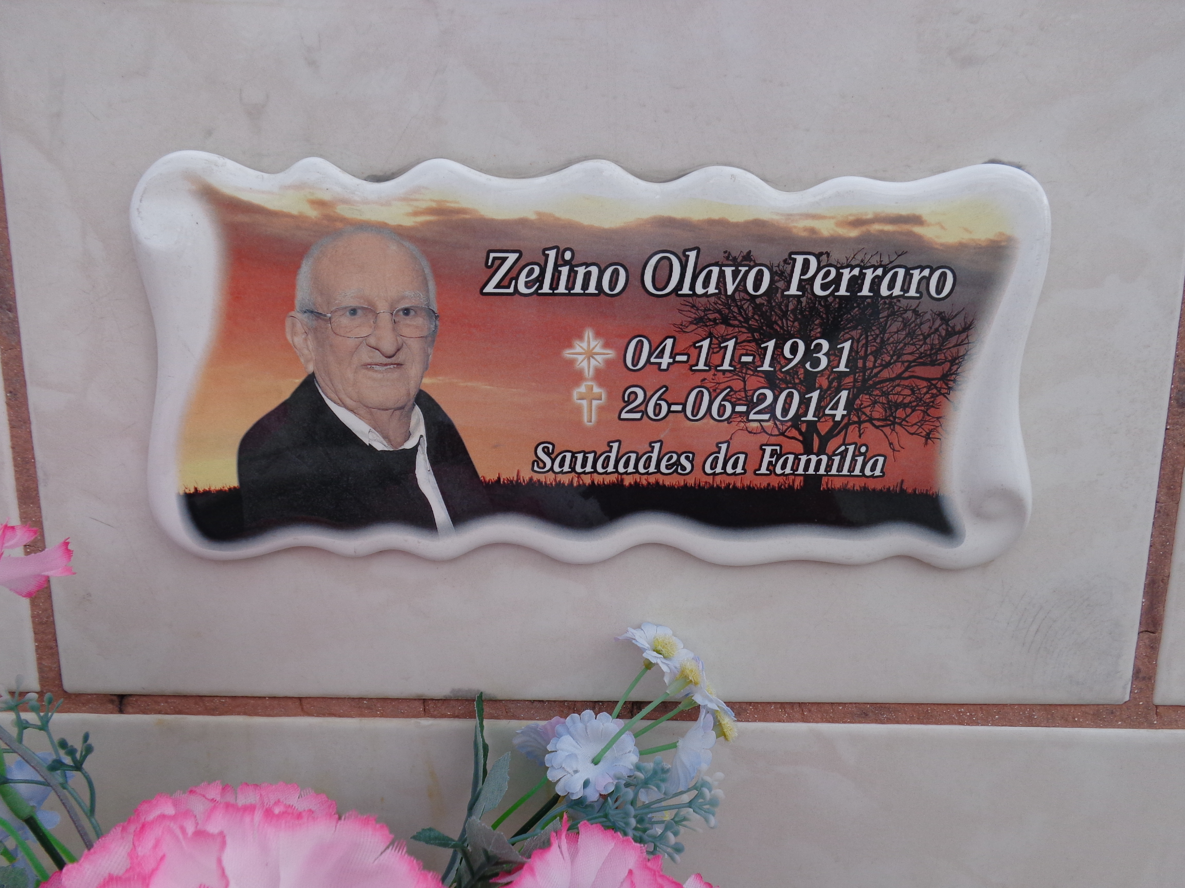 Sepultura de Zelino Olavo Perraro no Cemitério Municipal de Tubarão